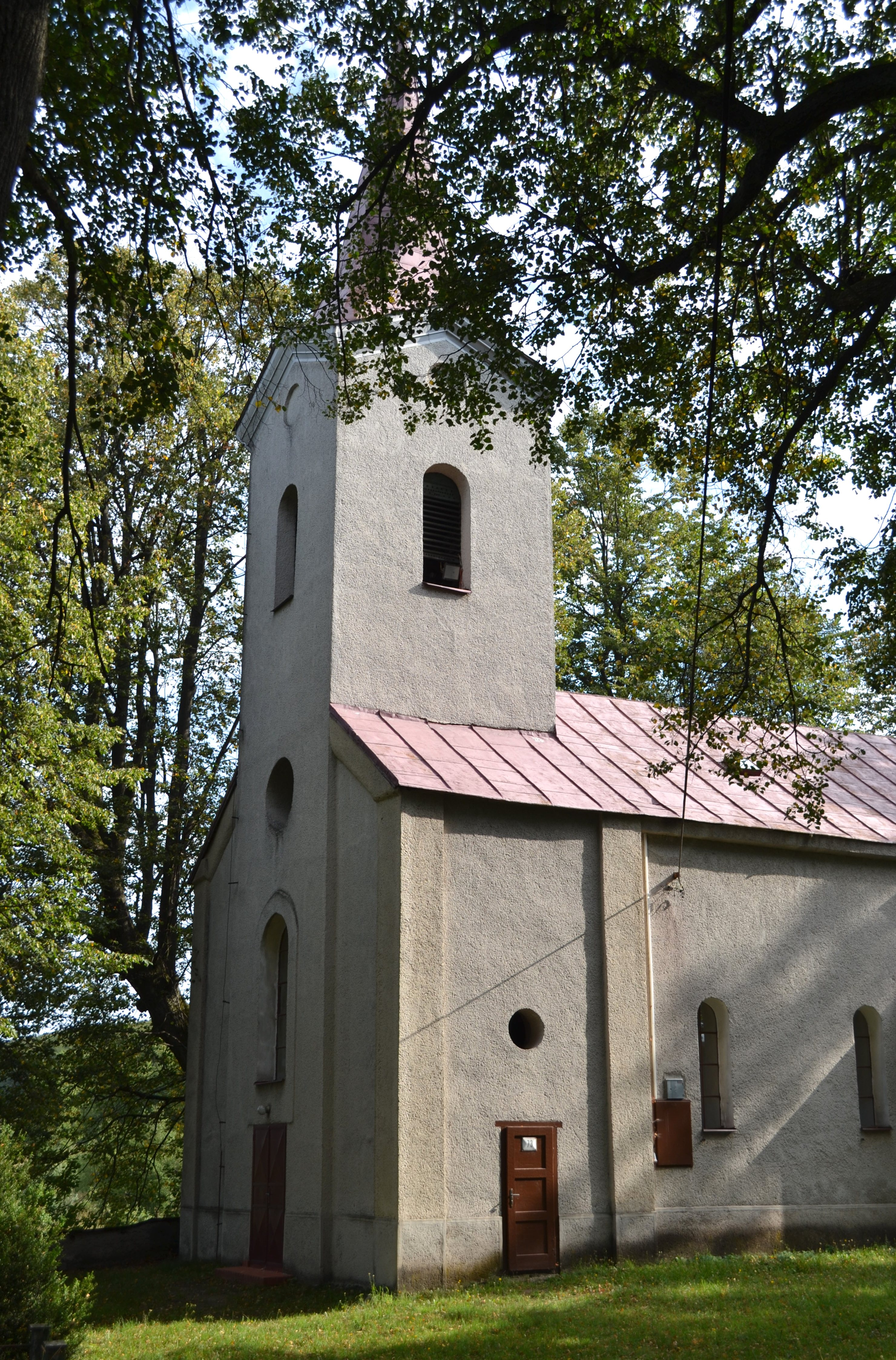 Renesančný kostol v Sucháni pochádza z roku 1530